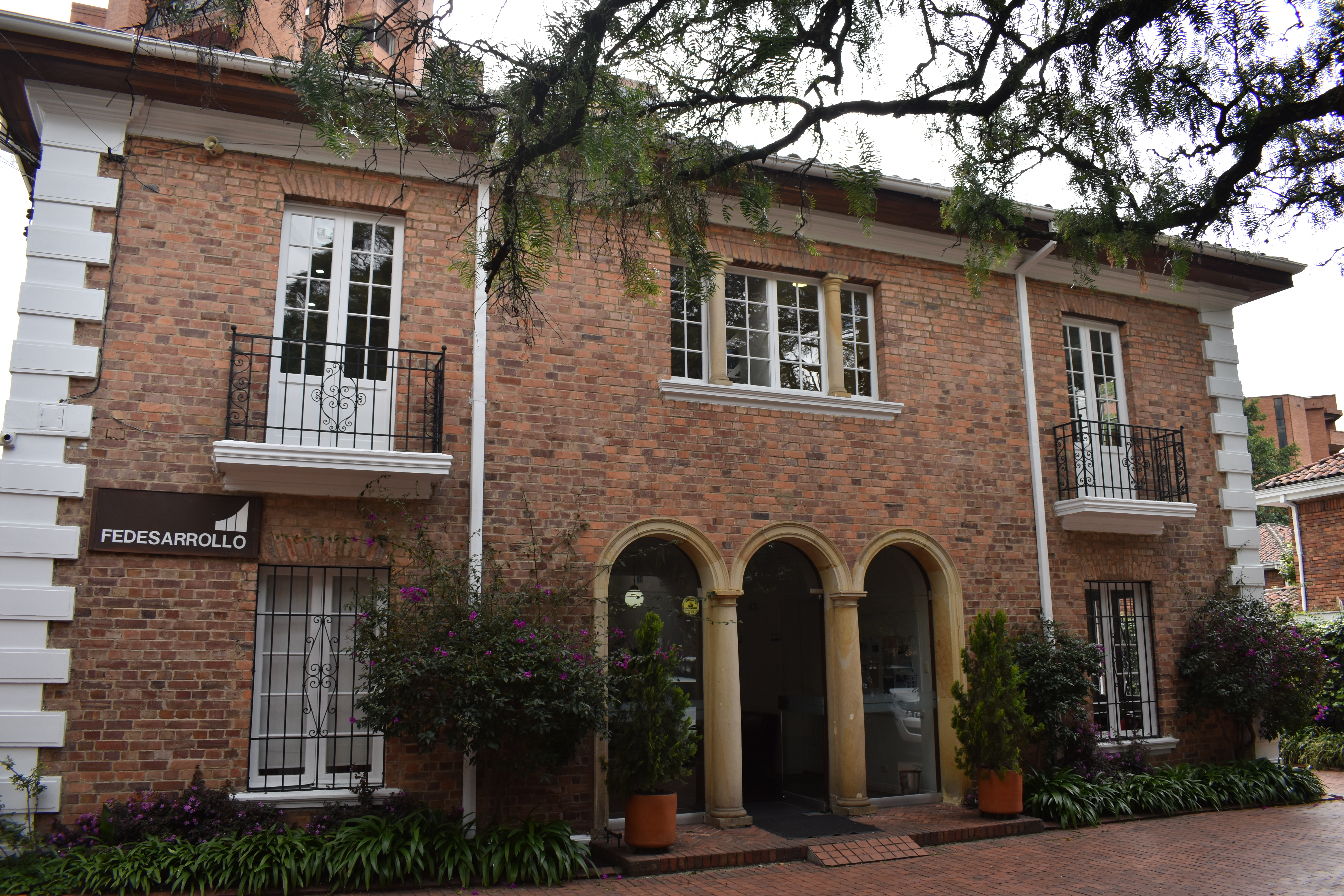 Fachada de la sede de Fedesarrollo, en Bogotá, CO